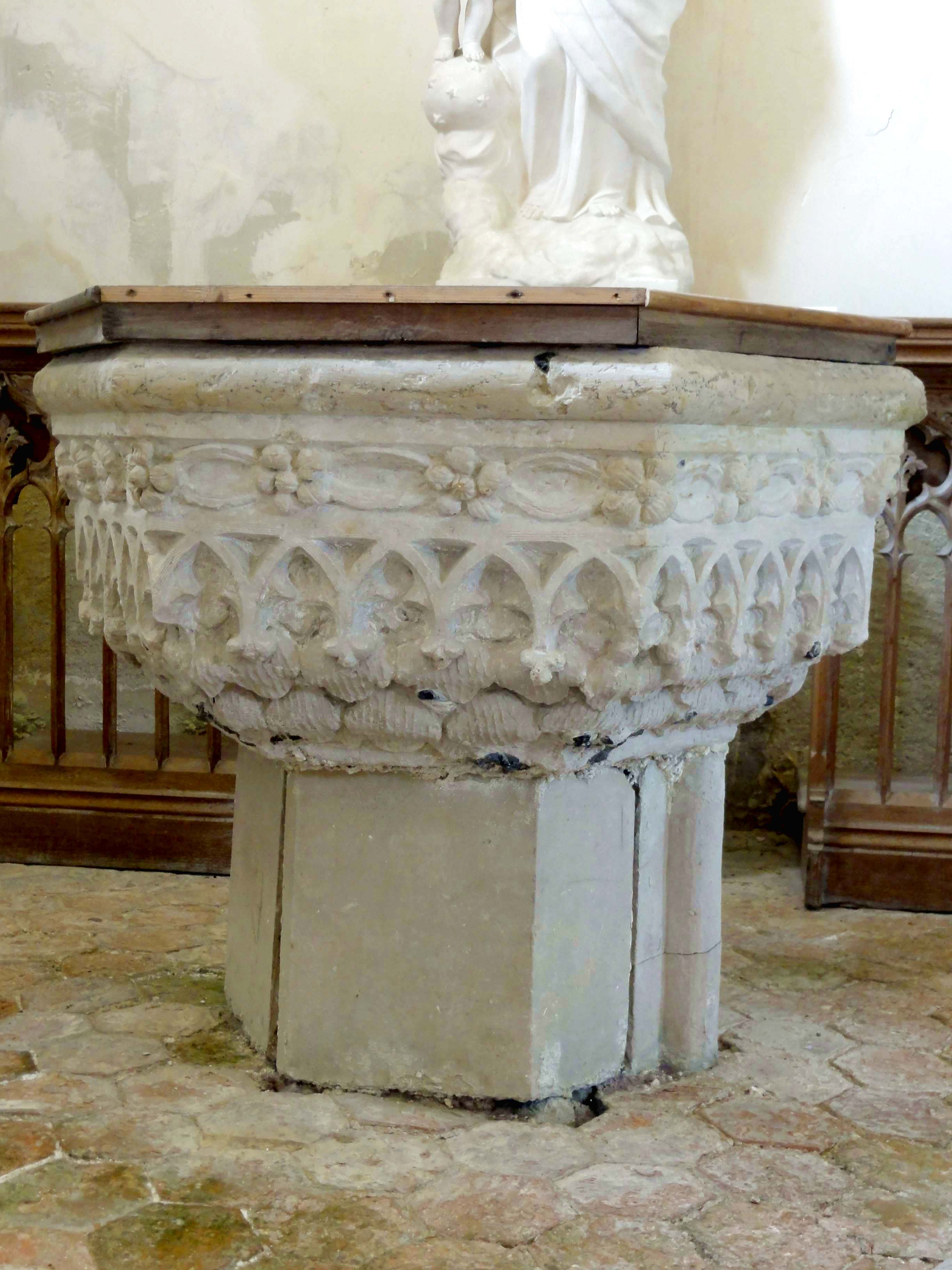 Mobilier de l'église (voir titre).